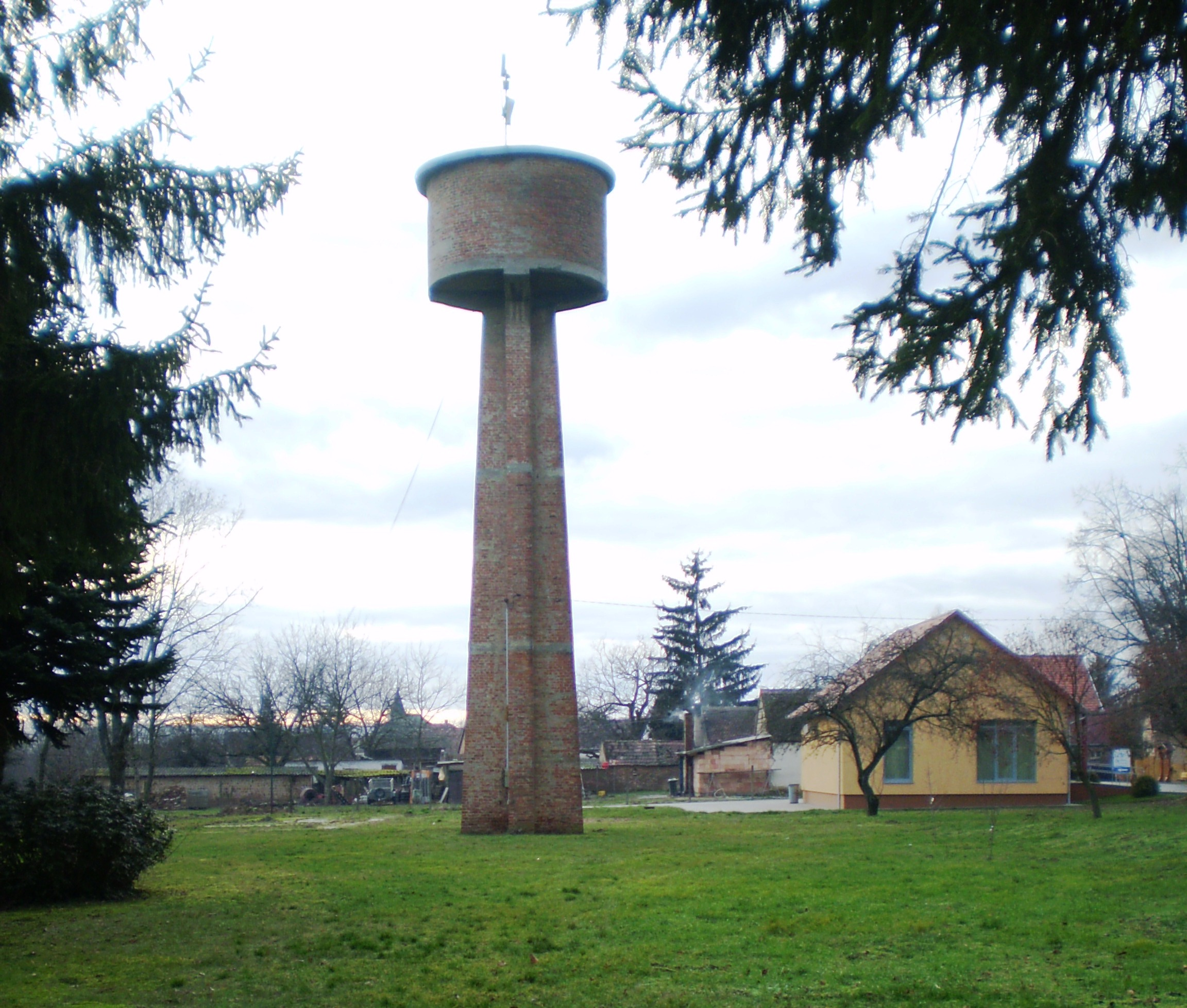 Park víztoronnyal Baksán